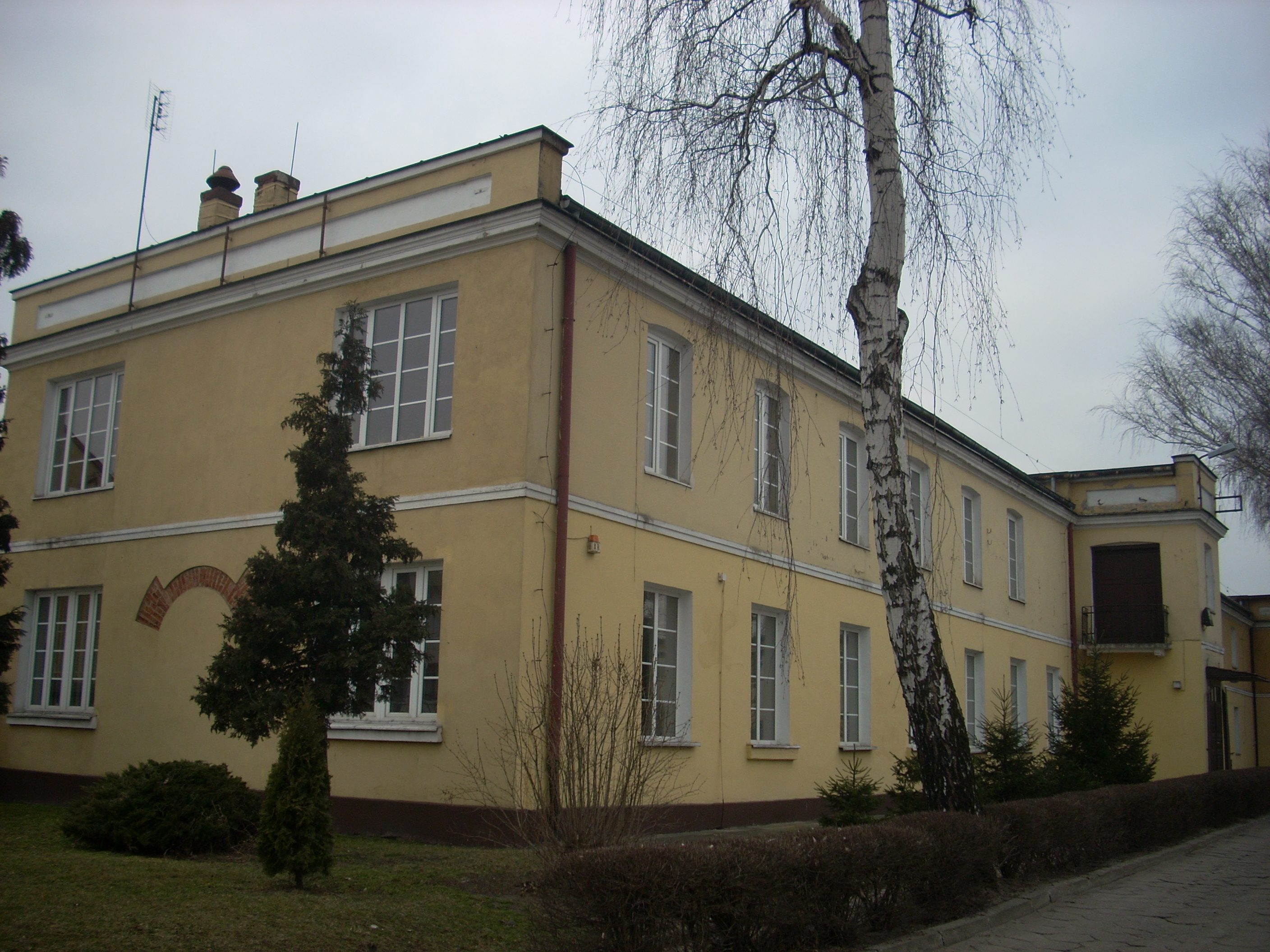 Budynek Zespołu Szkół im. 10 pułku piechoty w Łowiczu. Dawne koszary im. Józefa Piłsudskiego, w których stacjonował 10 pułk piechoty